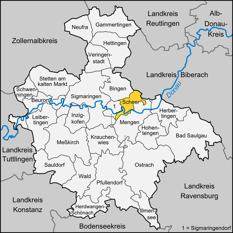 Karte der Stadt Scheer im Landkreis Sigmaringen